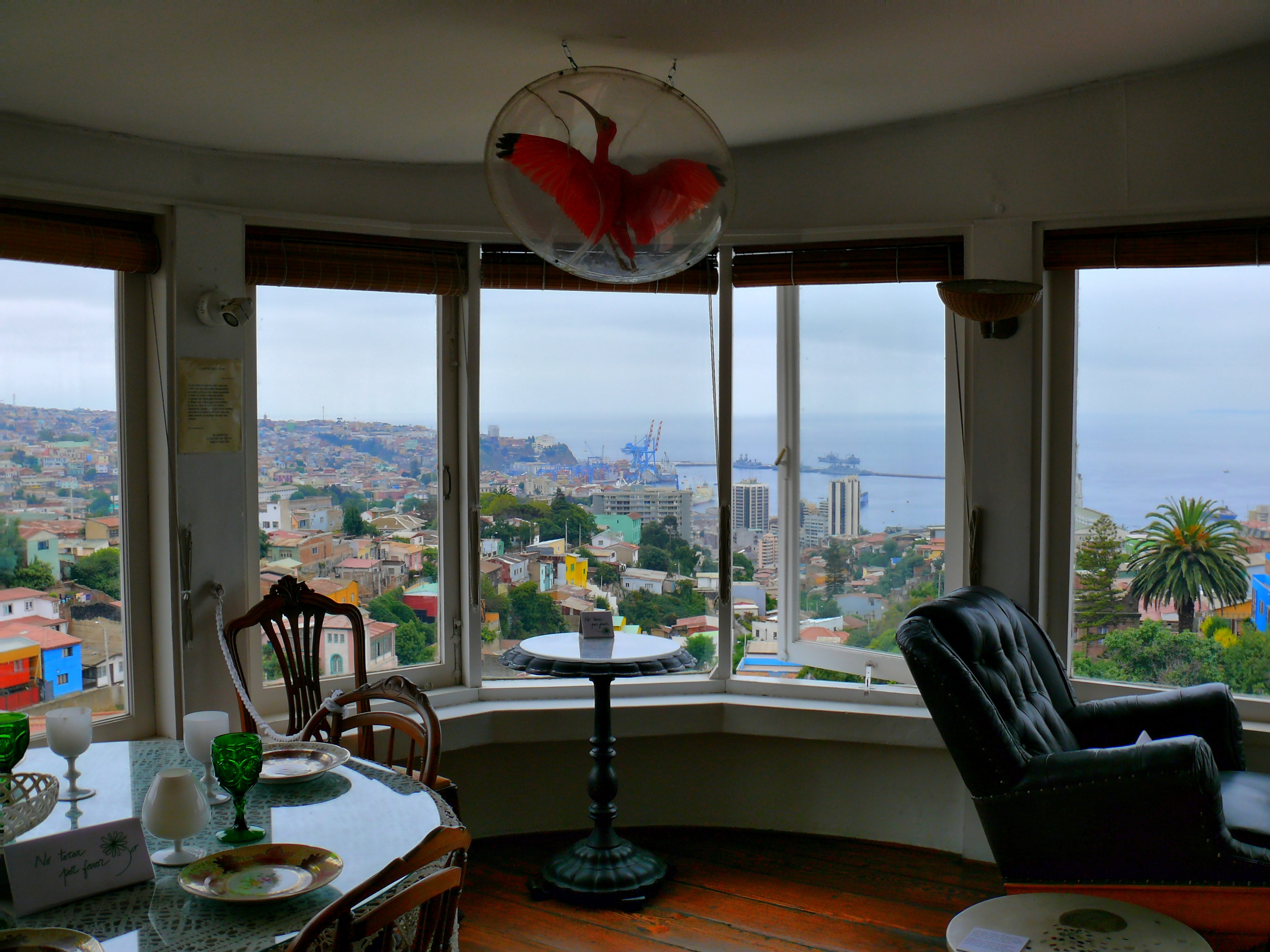 Vista de Valparaíso desde la Casa de Pablo Neruda "La Sebastiana" This is a photo of a national monument in Chile: 2206